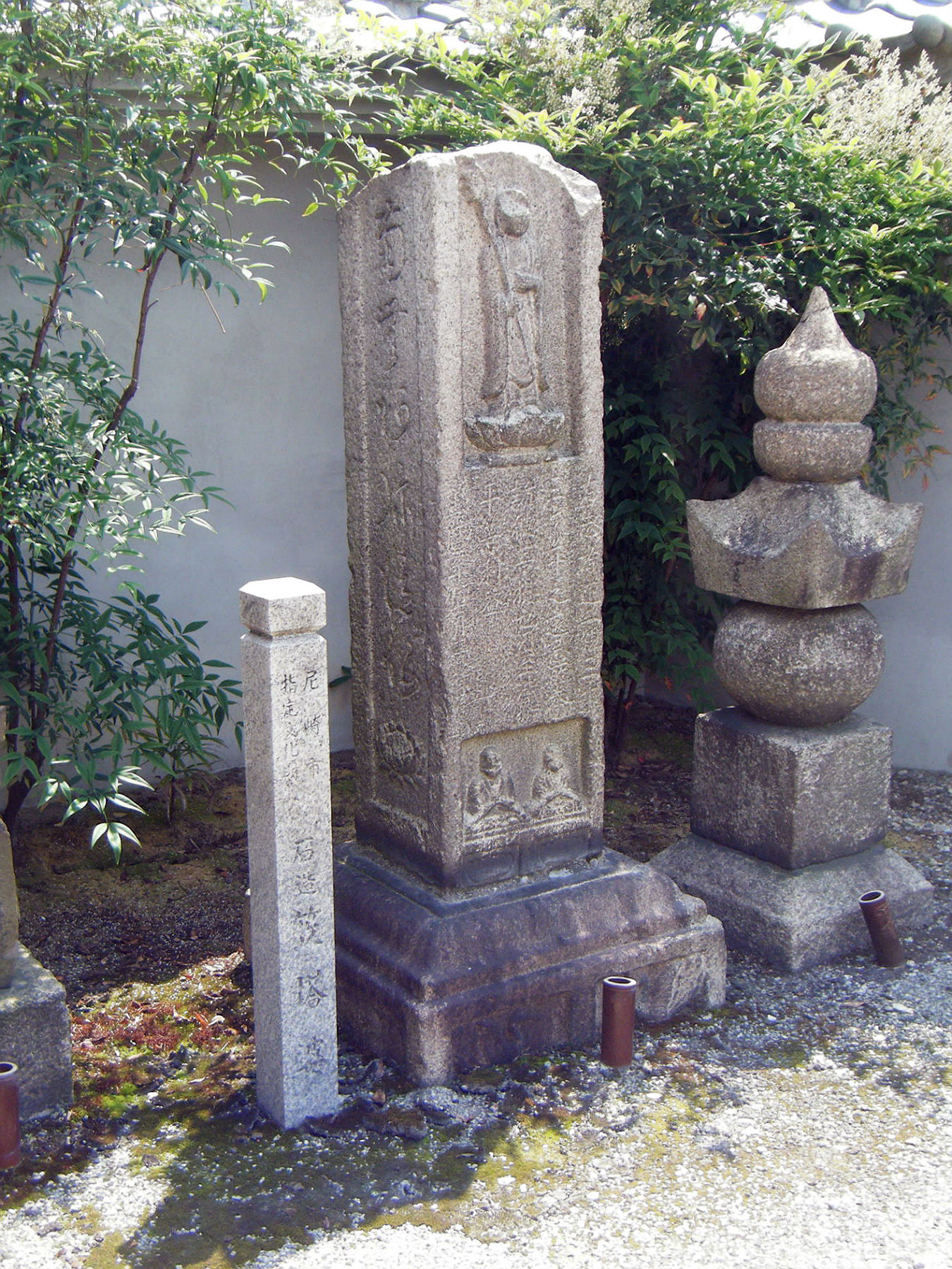 如来院嘉暦2年笠塔婆 兵庫県尼崎市